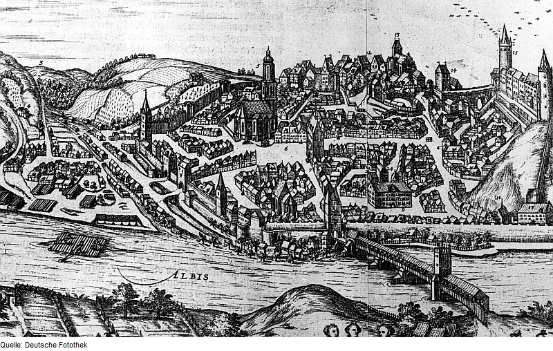 Original image description from the Deutsche Fotothek Meißen. Stadtansicht mit Walke links vom Brückenturm, Ausschnitt, 1575